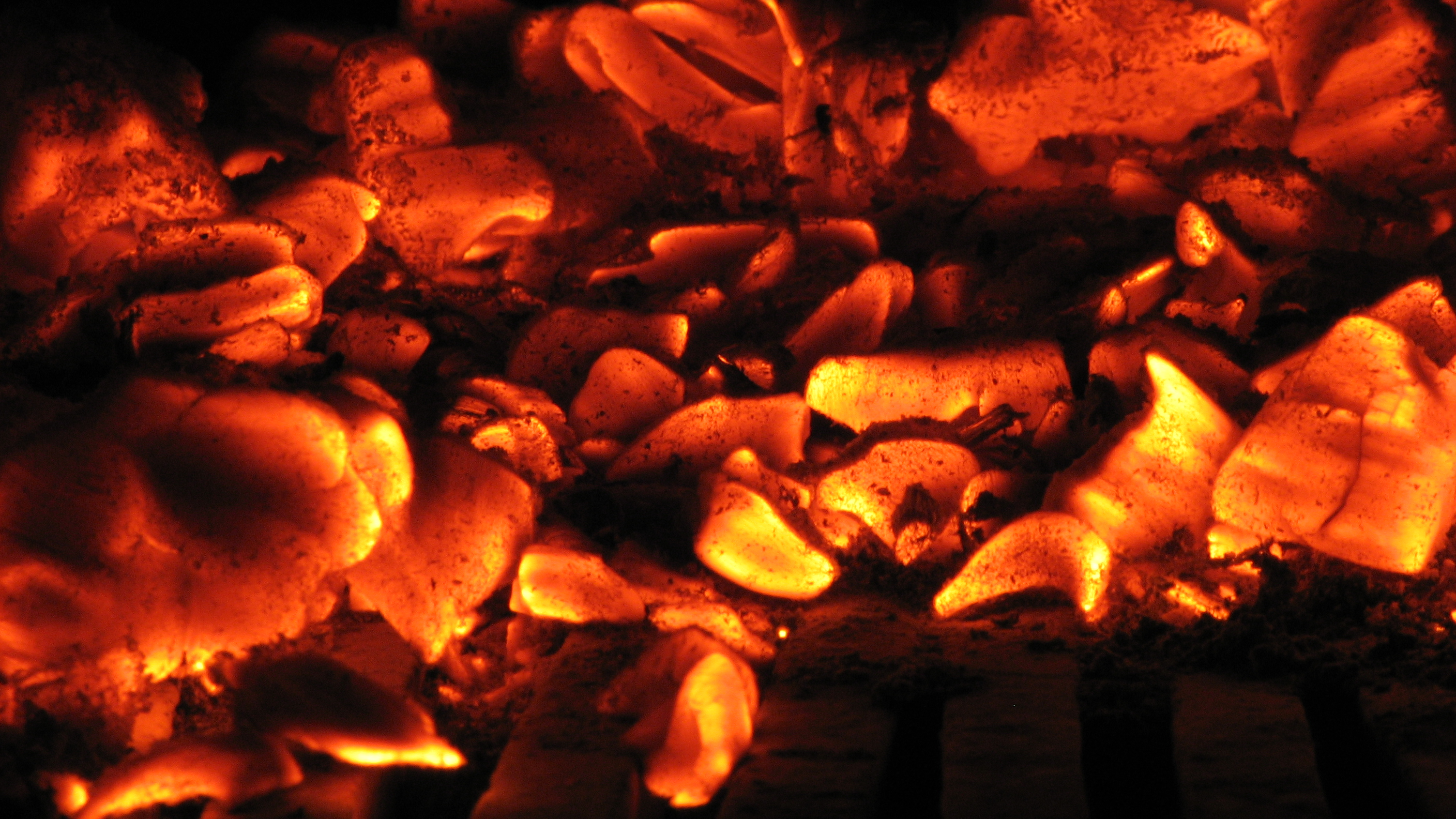 Takassa palavaa hiiltä